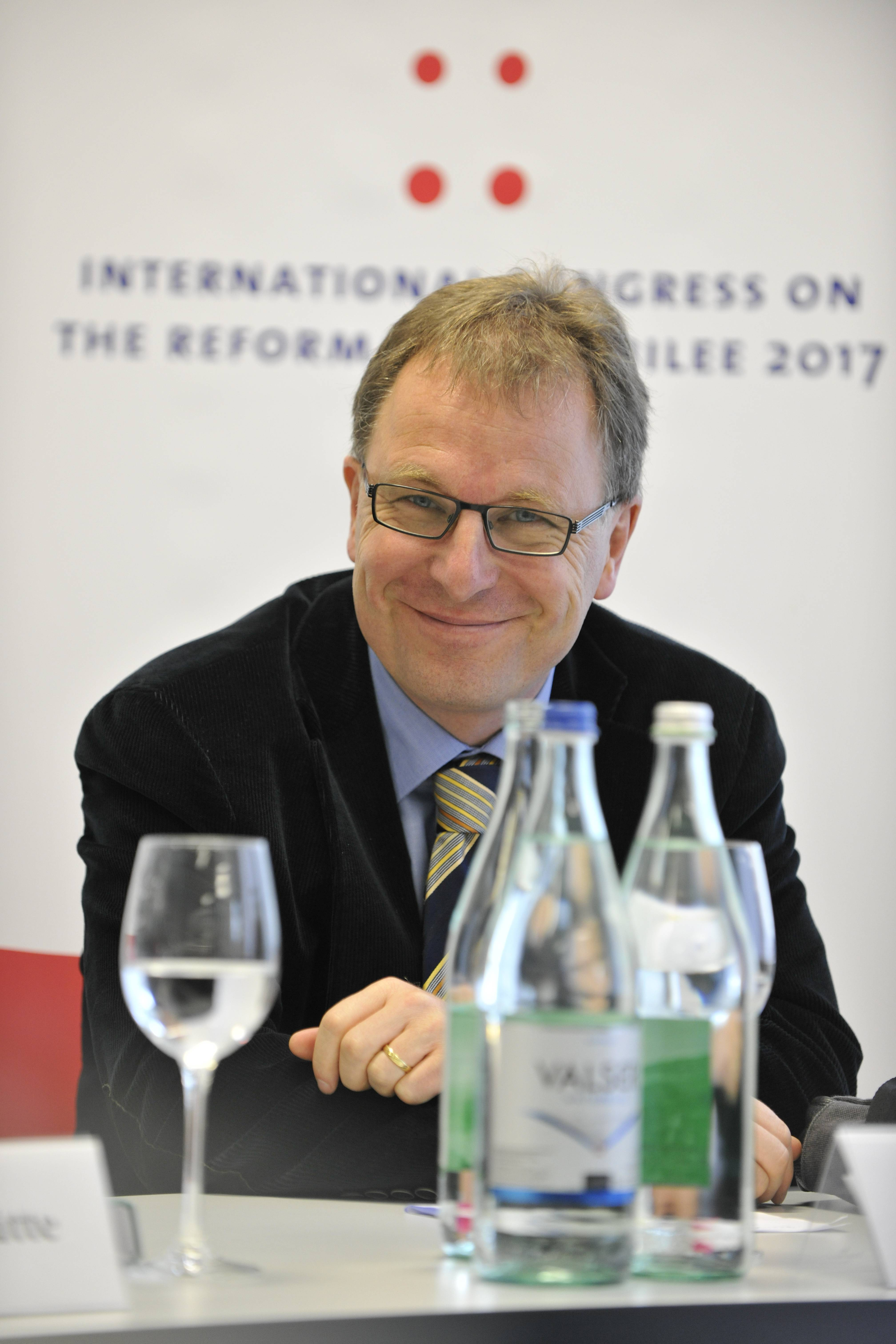 Abschlusspressekonferenz: 9. Oktober 2013, 12:45-13:15 Michel Müller, Präsident des Kirchenrates der evangelisch-reformierten Kirche des Kantons Zürich